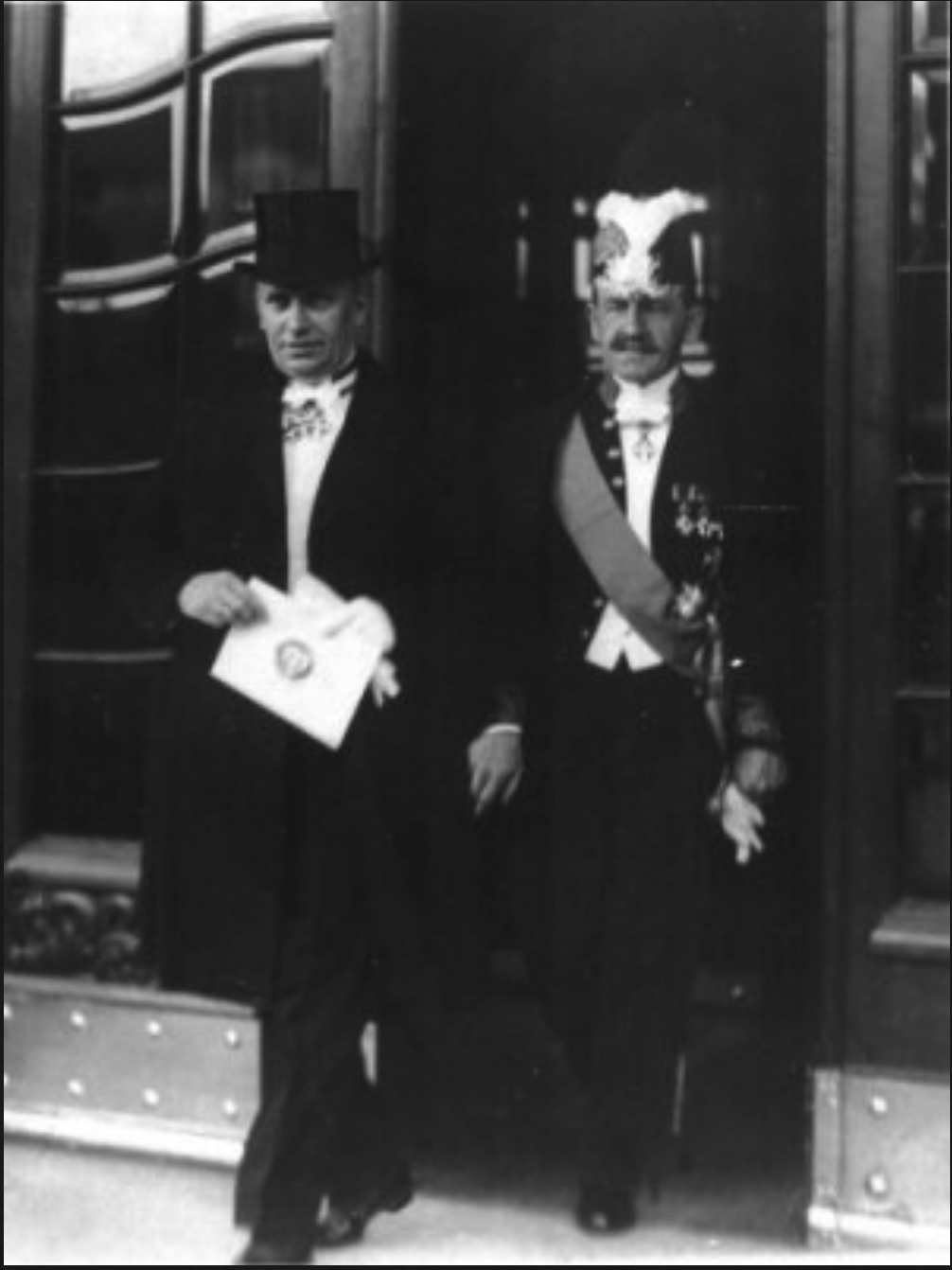 Jurgis Savickis (1890–1952), links, als Gesandter Litauens in Kopenhagen, Dänemark